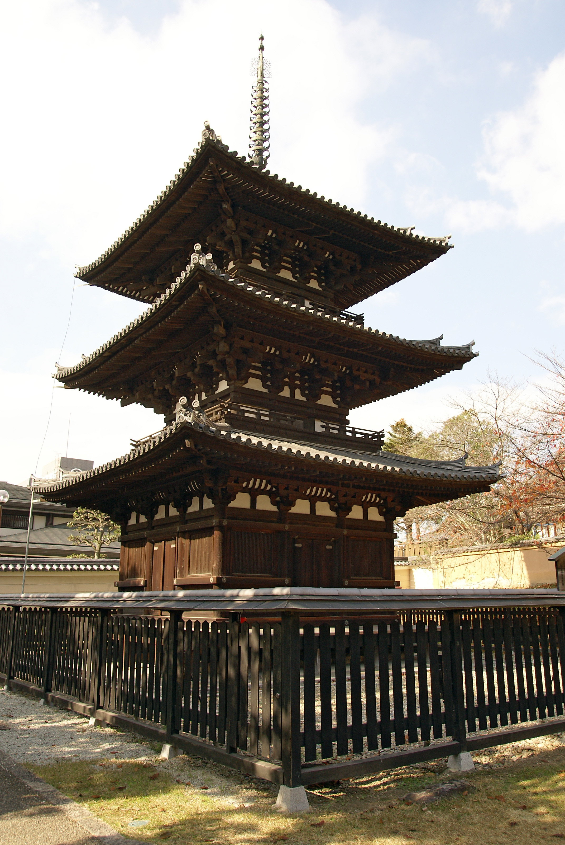 Kofukuji in Nara, Nara prefecture, Japan